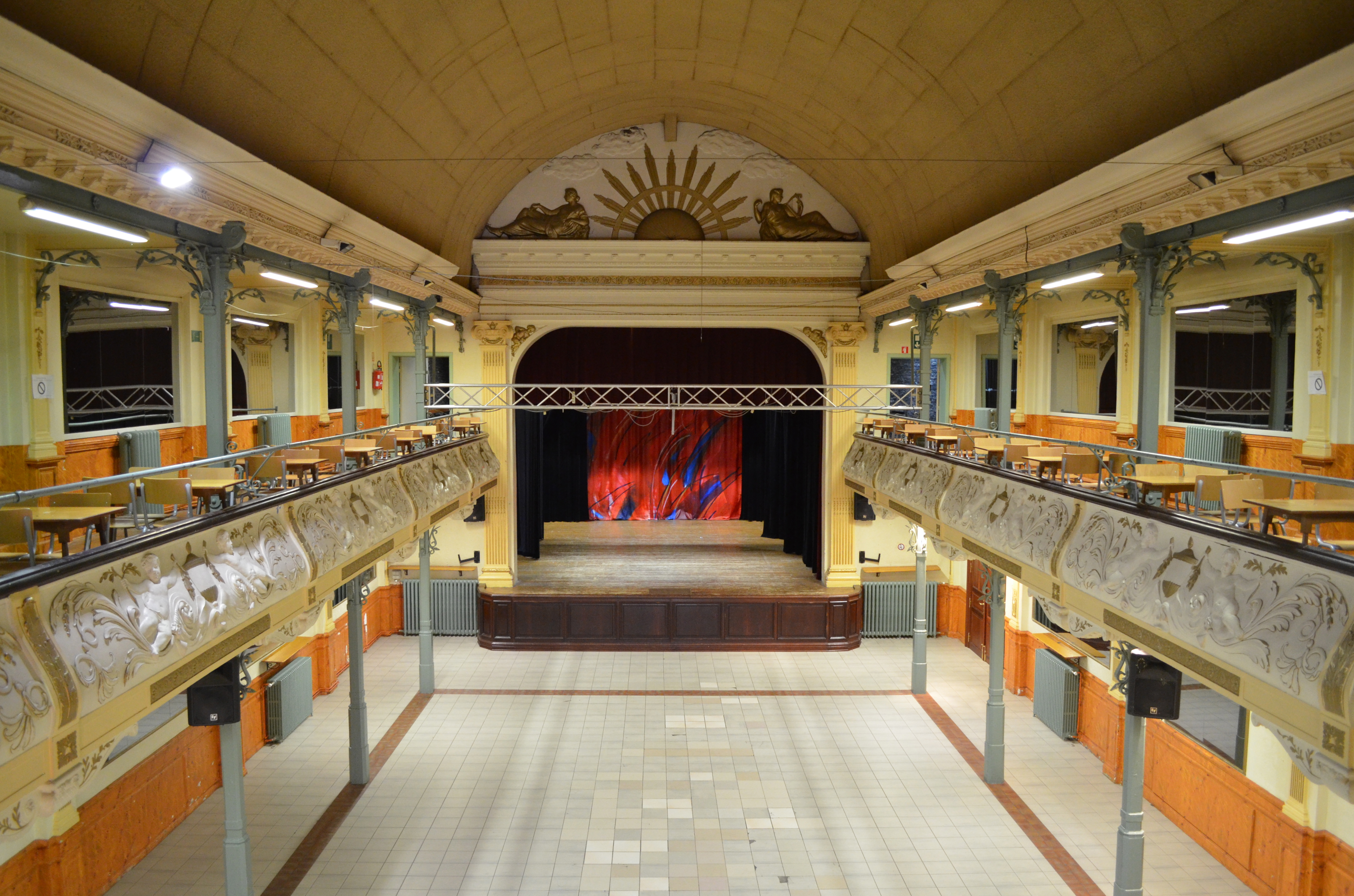 Lodelinsart (Charleroi-Belgique) - Salle de la Ruche verrière